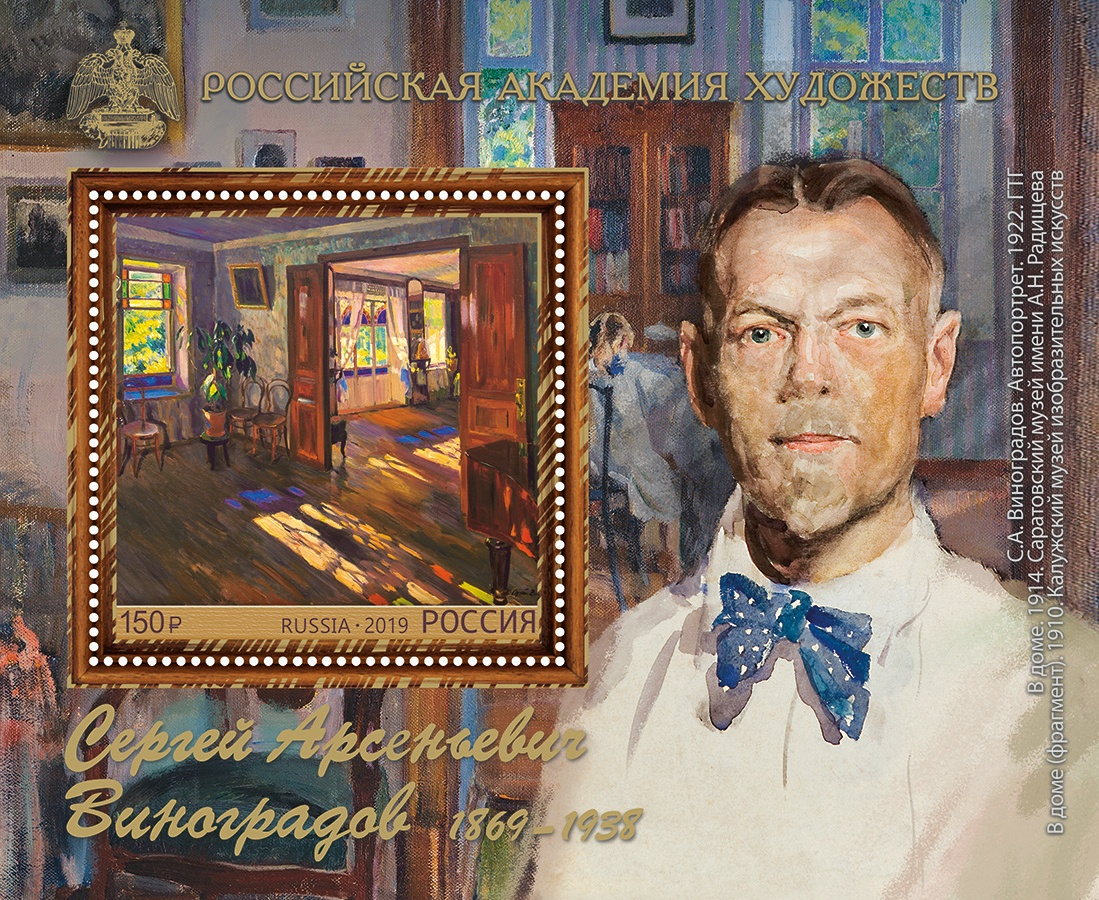 В почтовое обращение вышел блок, посвящённый 150-летию со дня рождения художника Сергея Арсеньевича Виноградова.